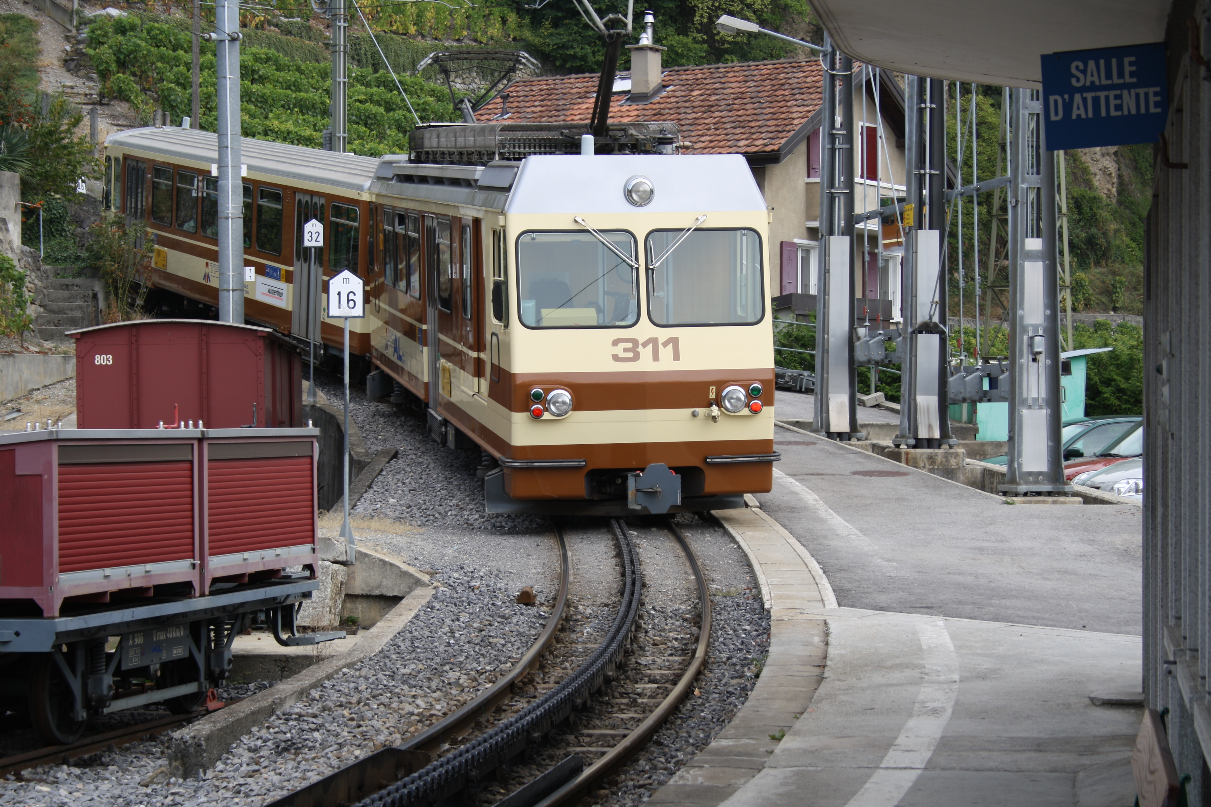 AL 311 in Aigle-Dépôt AL